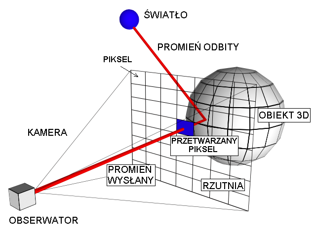 Sposób określania barwy piksela w raytracigu.